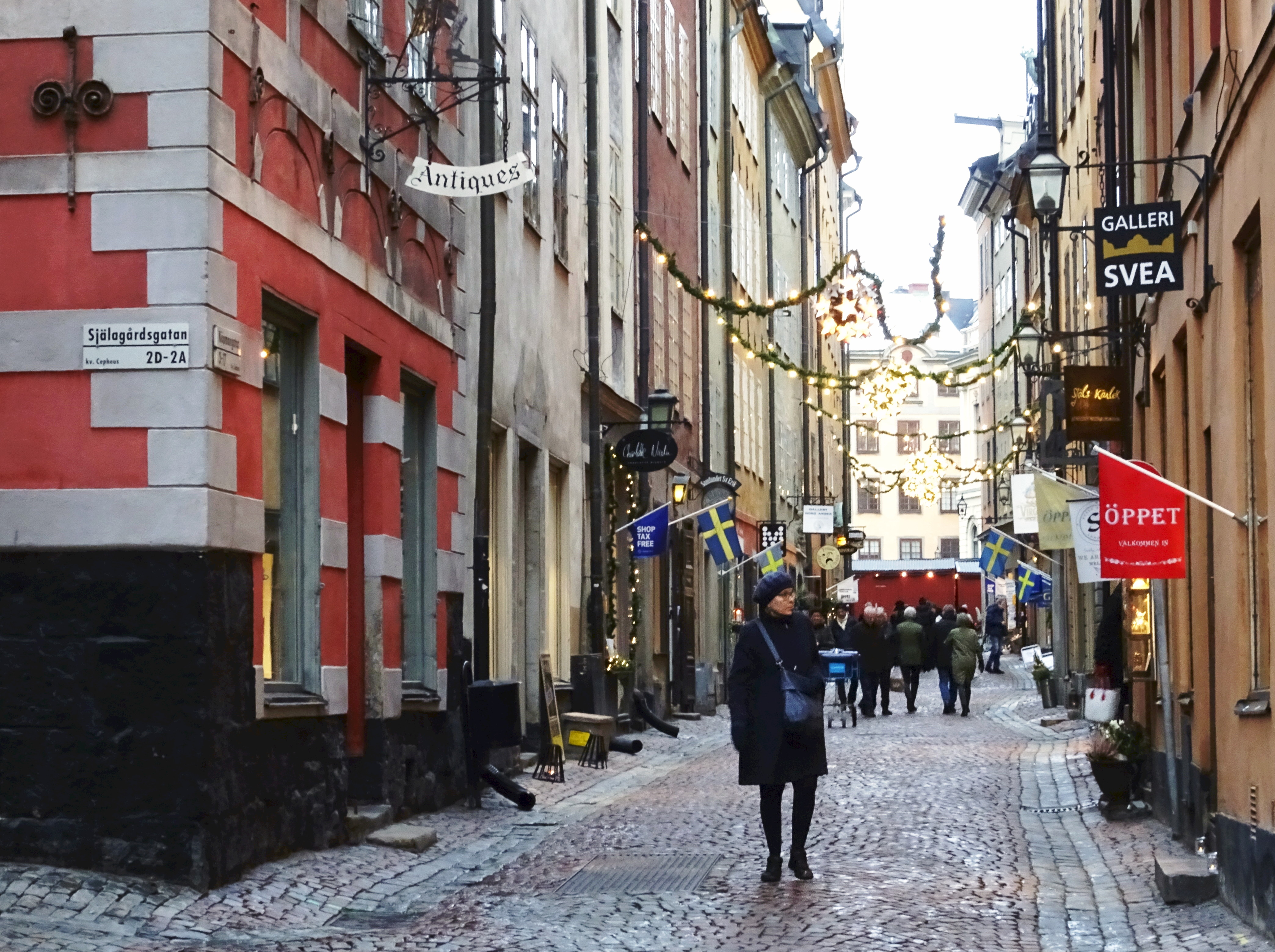 Köpmangatan med julbelysning, vy mot Stortorget